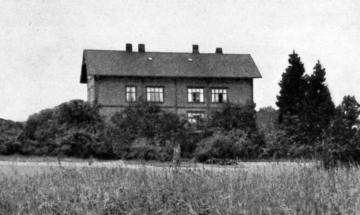 Løren skole - opprinnelig skolebygg fra ca 1891